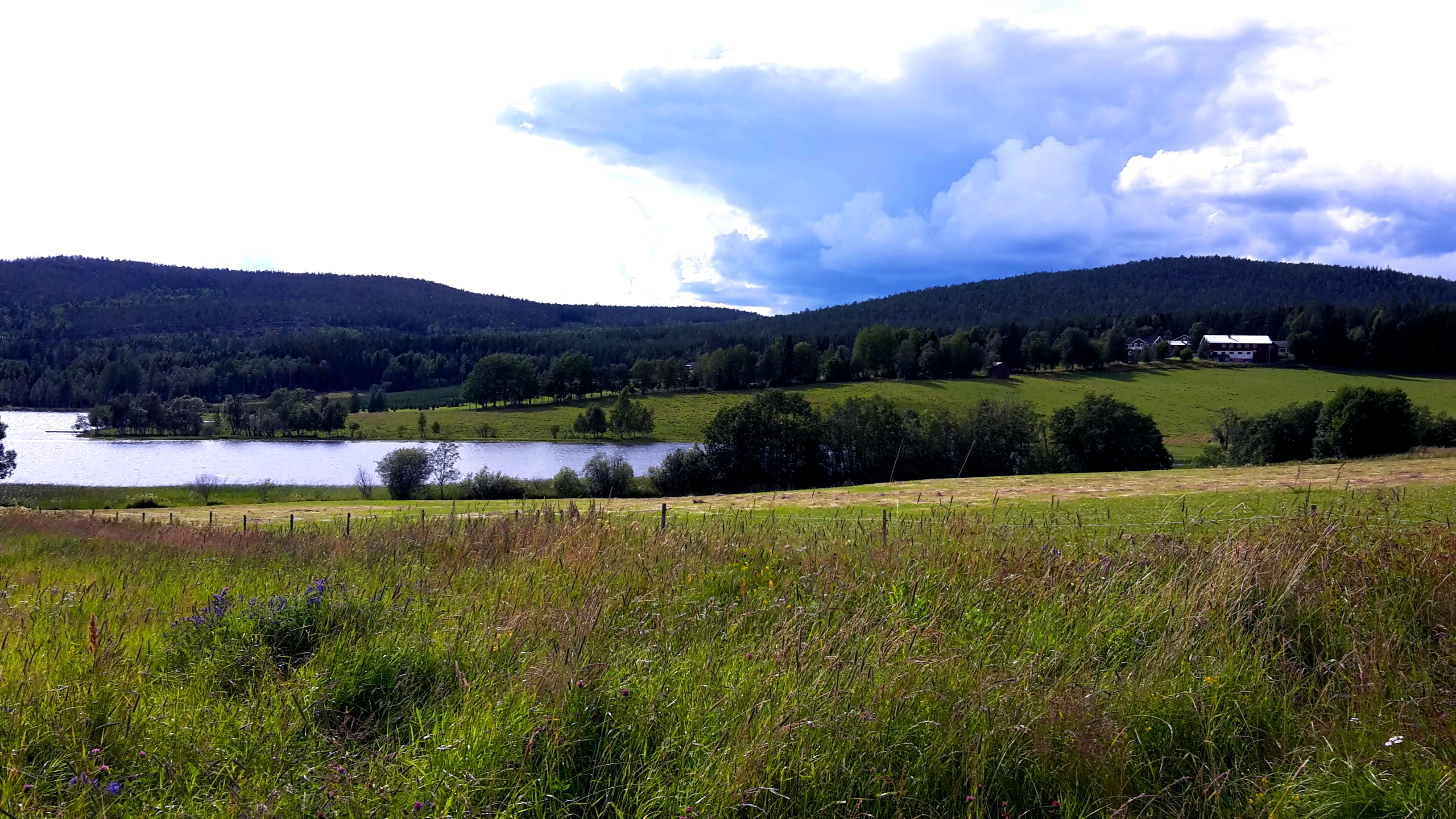 Backsjösjöns nordöstra ände, fotograferad från vägen i Norrbacksjö.